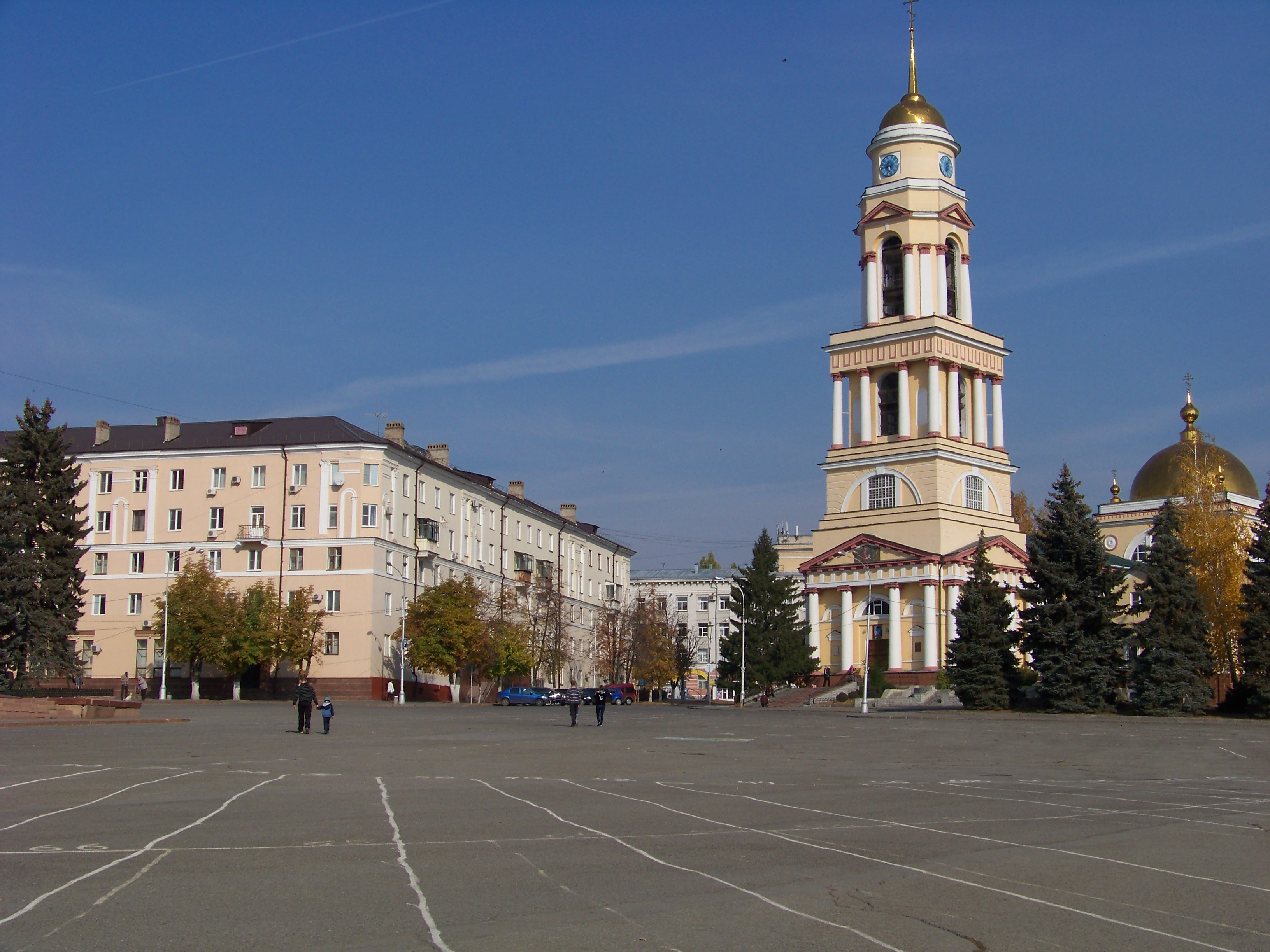 Собор Рождества Христова (Липецкая область, Липецк, пл. Ленина, 4)